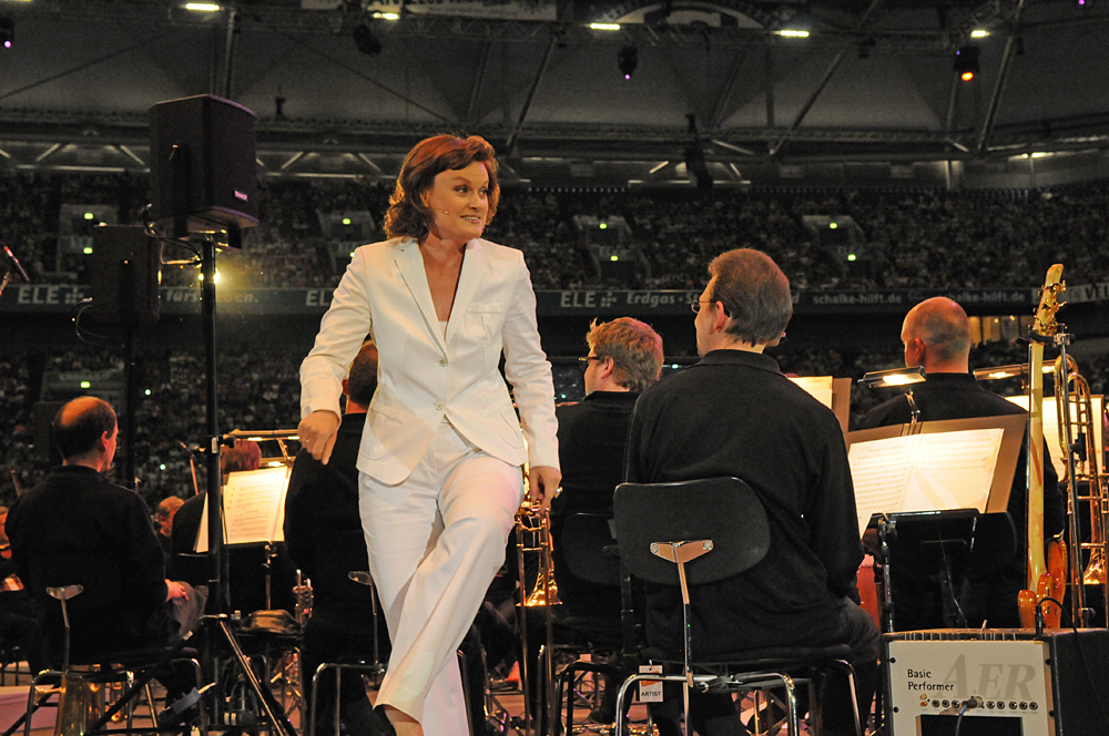 Vesselina Kasarova beim Abschlusskonzert von „!SING - DAY OF SONG“ in der Veltins-Arena in Gelsenkirchen